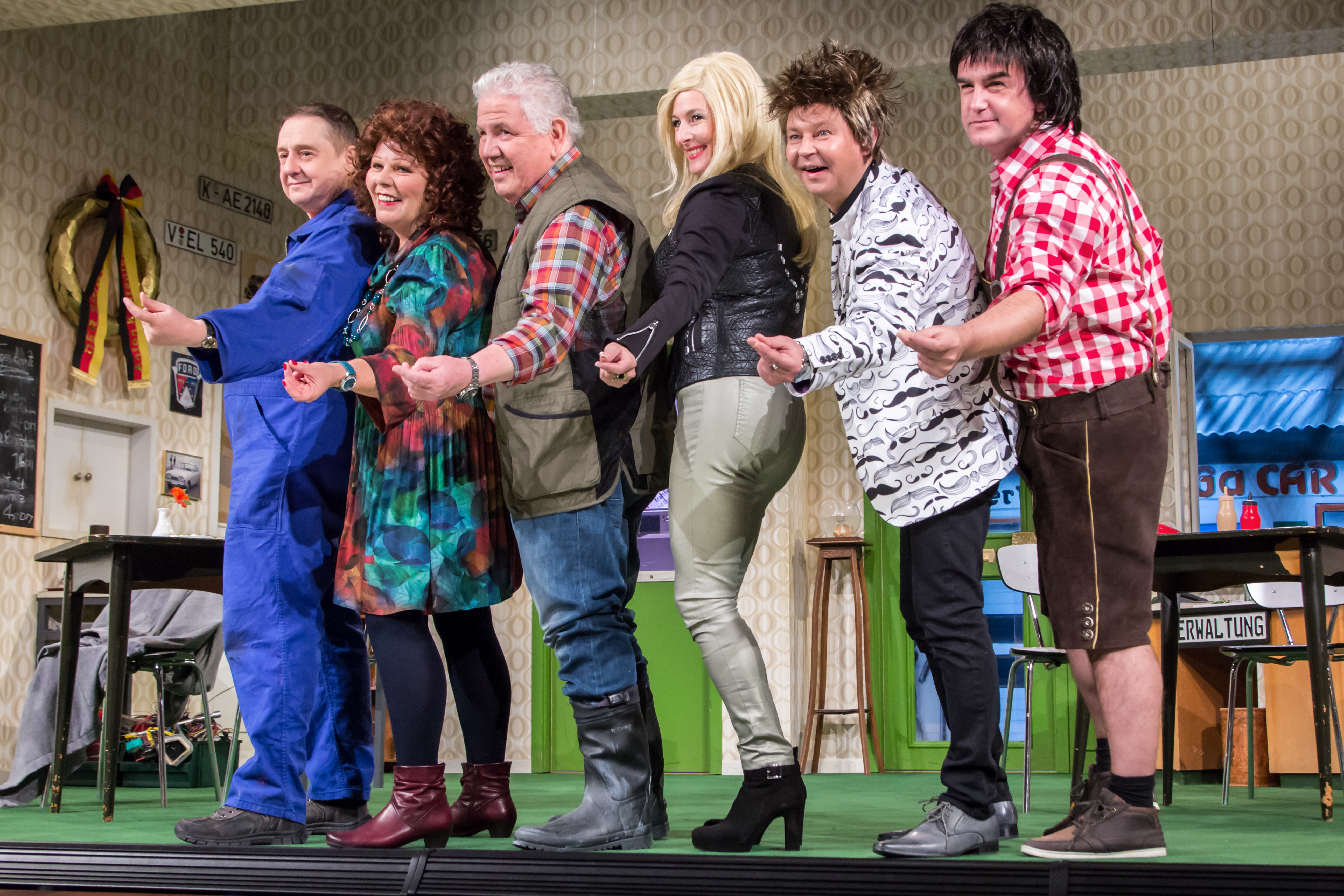 Szene aus dem Stück "Käsch in de Täsch" aus dem Millowitsch-Theater in Köln, 2015. Leo Mader, Samy Orfgen, Peter Millowitsch, Ariana Weil, Dmitri Alexandrov, Ivan Robert